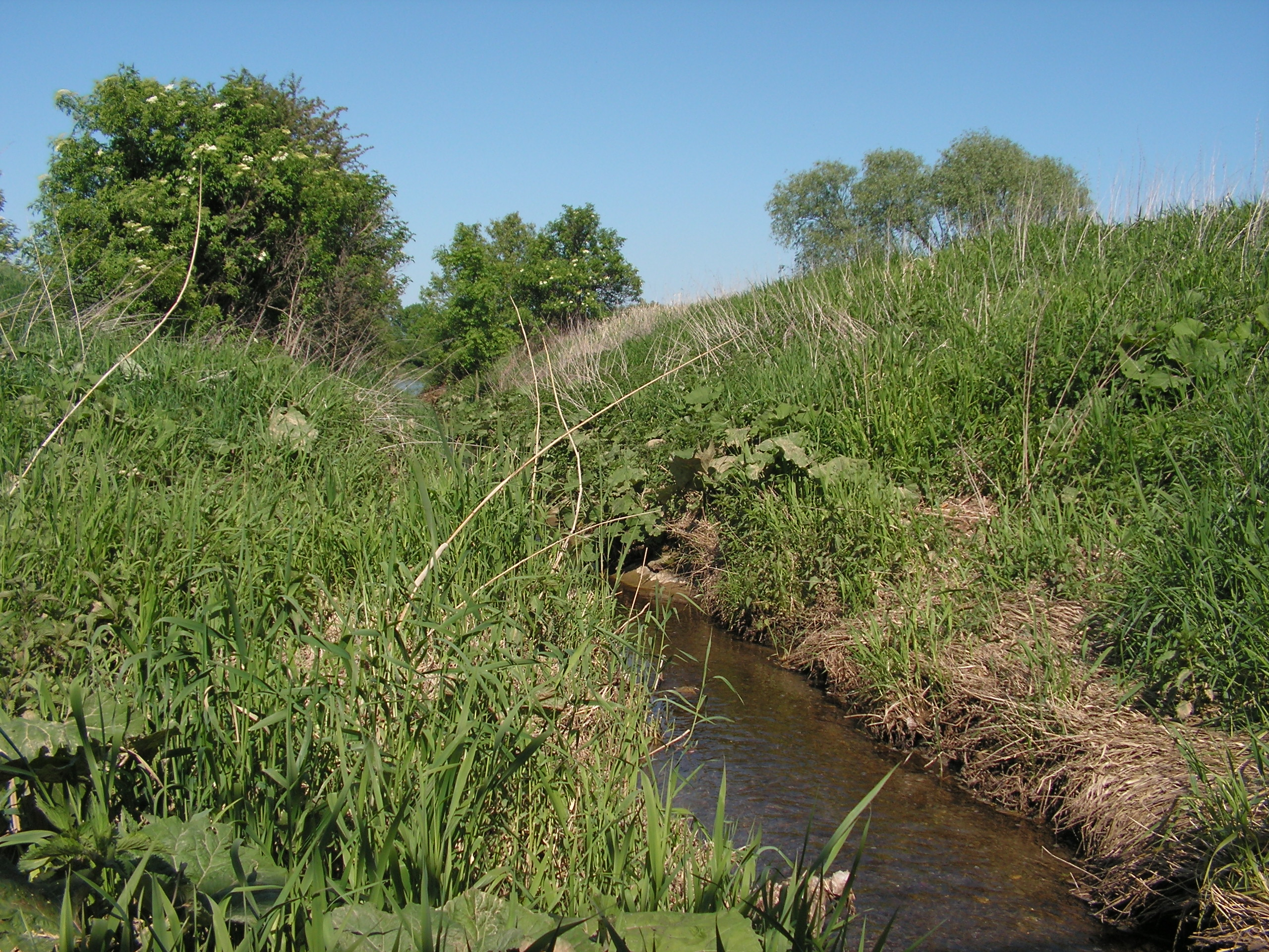 Potok Křenovka nad rybníkem Utopenec v okrese Kutná Hora.